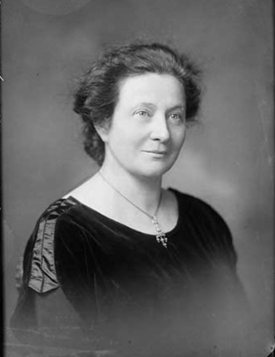 portrét Františky Plamínkové. Langhans Studio Praha 1921